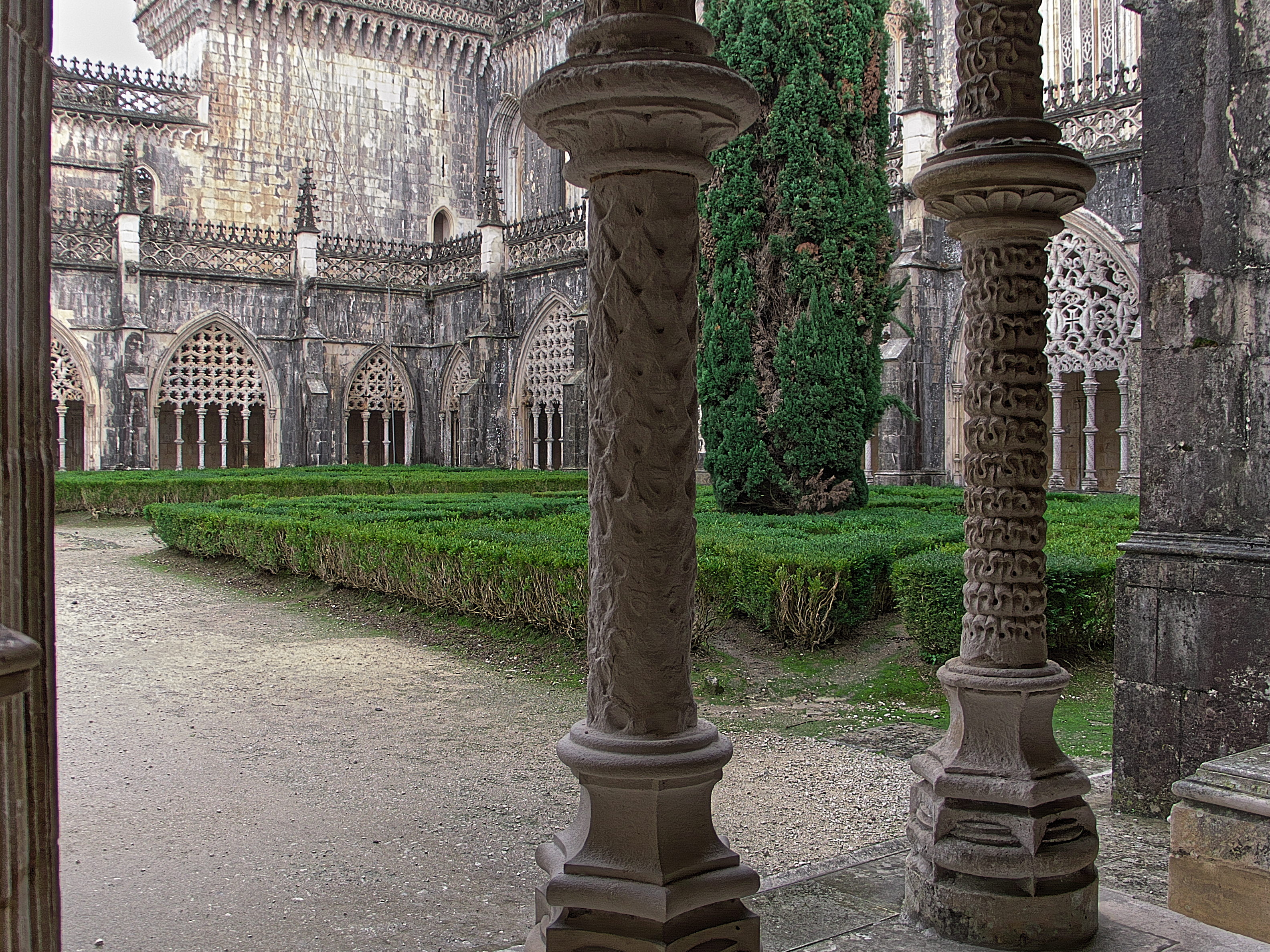 Pormenor. Claustro trazado por Afonso Domingues